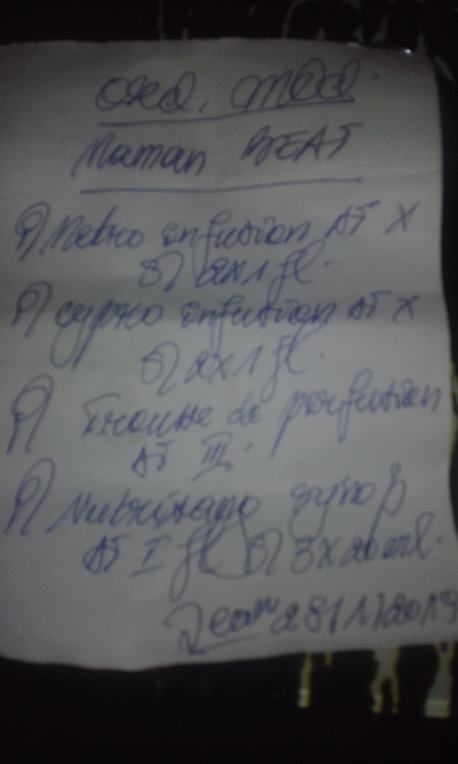 Capturée à Kisangani.